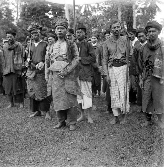 Repronegatief. Adathoofden van de Minangkabau met gevolg